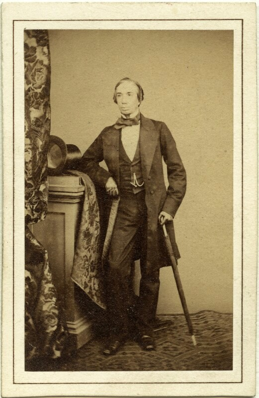 Photograph by Henry Hering